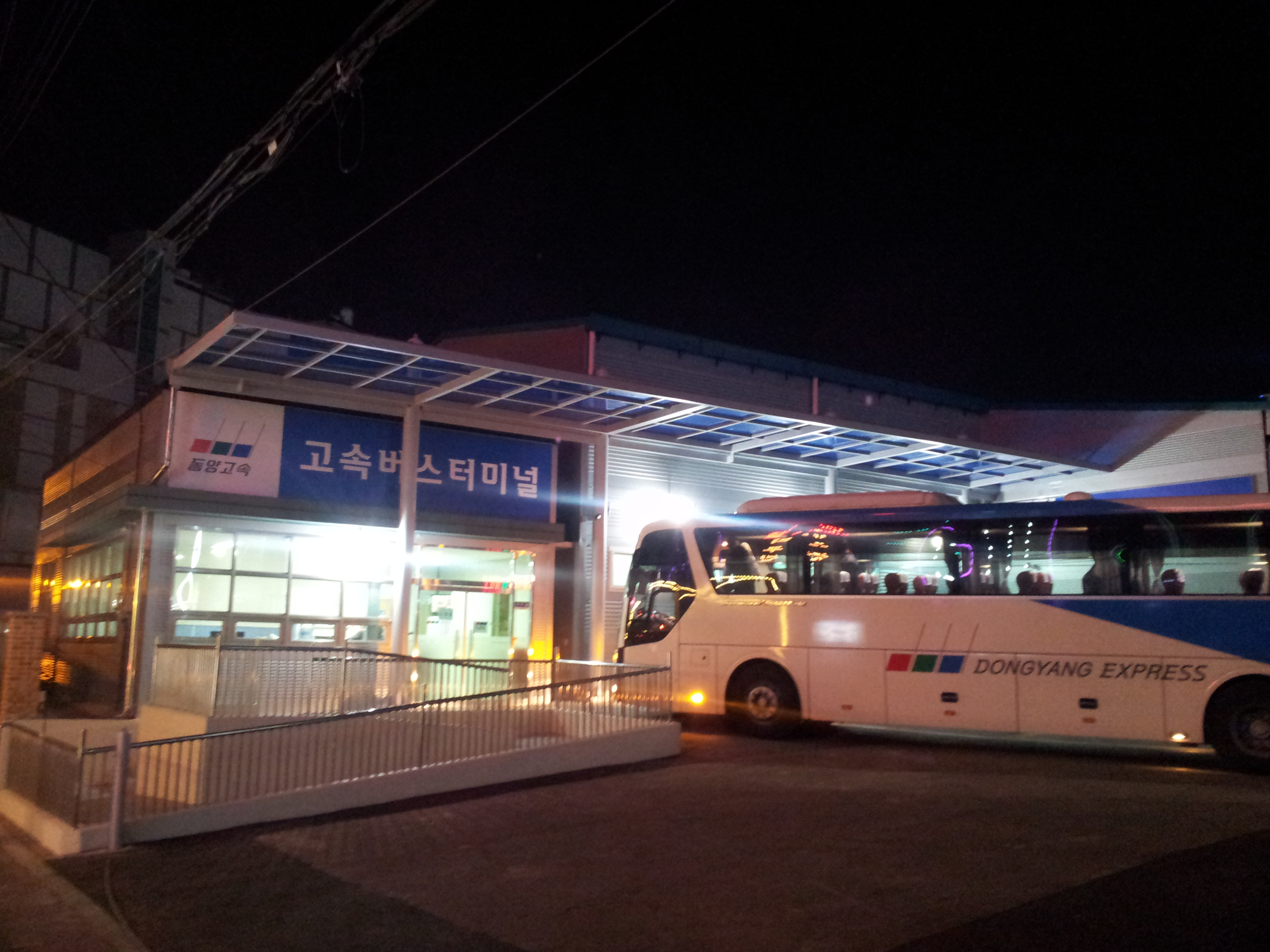 임시 아산고속버스터미널 모습